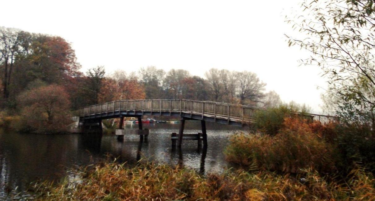 Die Bebensundbrücke / Seescharwaldbruecke in Eutin